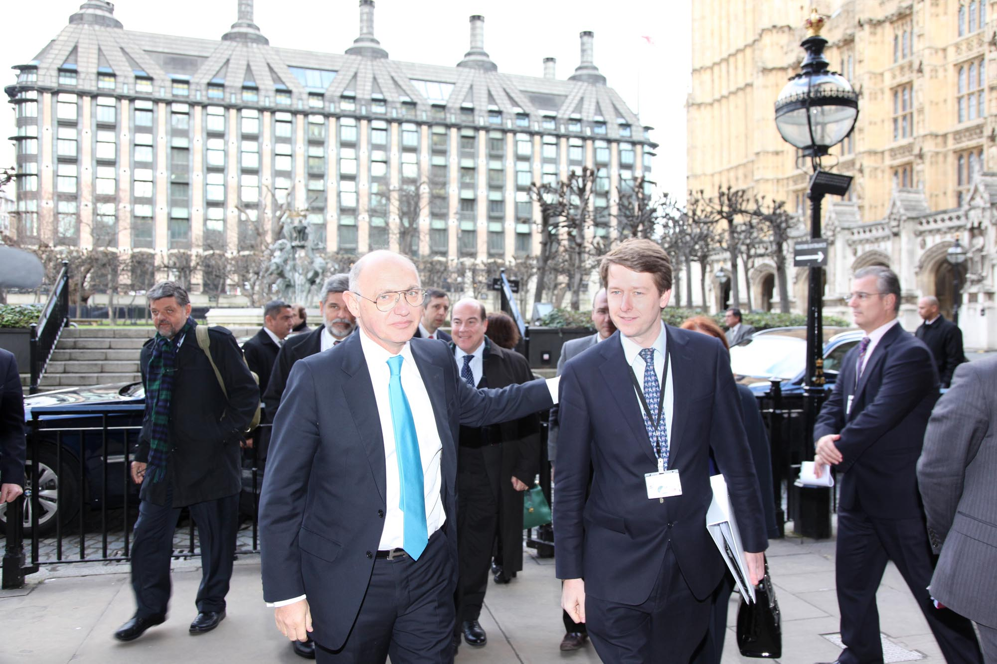 5 Parlamento